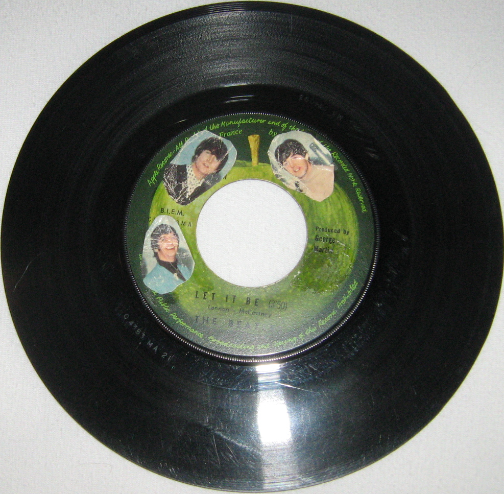 Let It Be Single